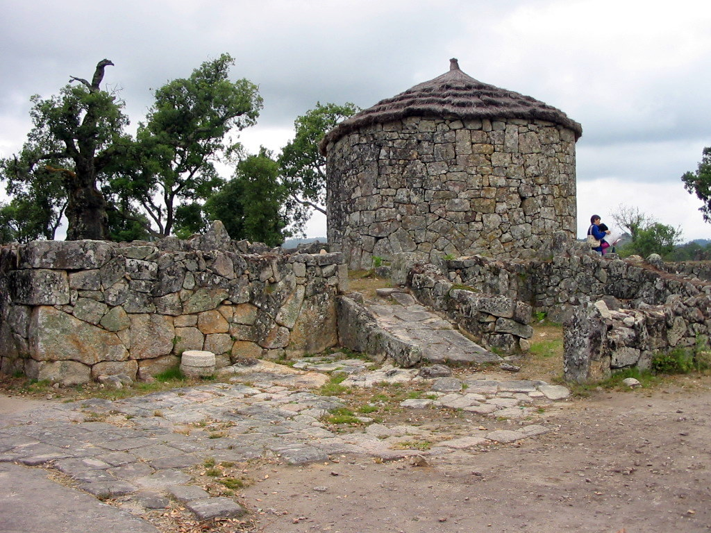 Citania de Briteiros (Guimarães, Portugal). Casas reconstruidas y pavimentación.